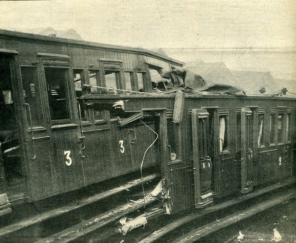 La catastrophe de Schaerbeek le 15/2/1904 deux voitures télescopées du train d'Anvers, dont elles se sont désolidarisées suite à un bris d'attelage, avant d'être embouties par la locomotive d'un autre convoi.